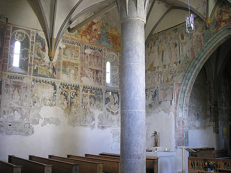 Alte Pfarrkirche St. Martin (Garmisch, Obb.). Das Langhaus nach Nordosten, Juni 2006